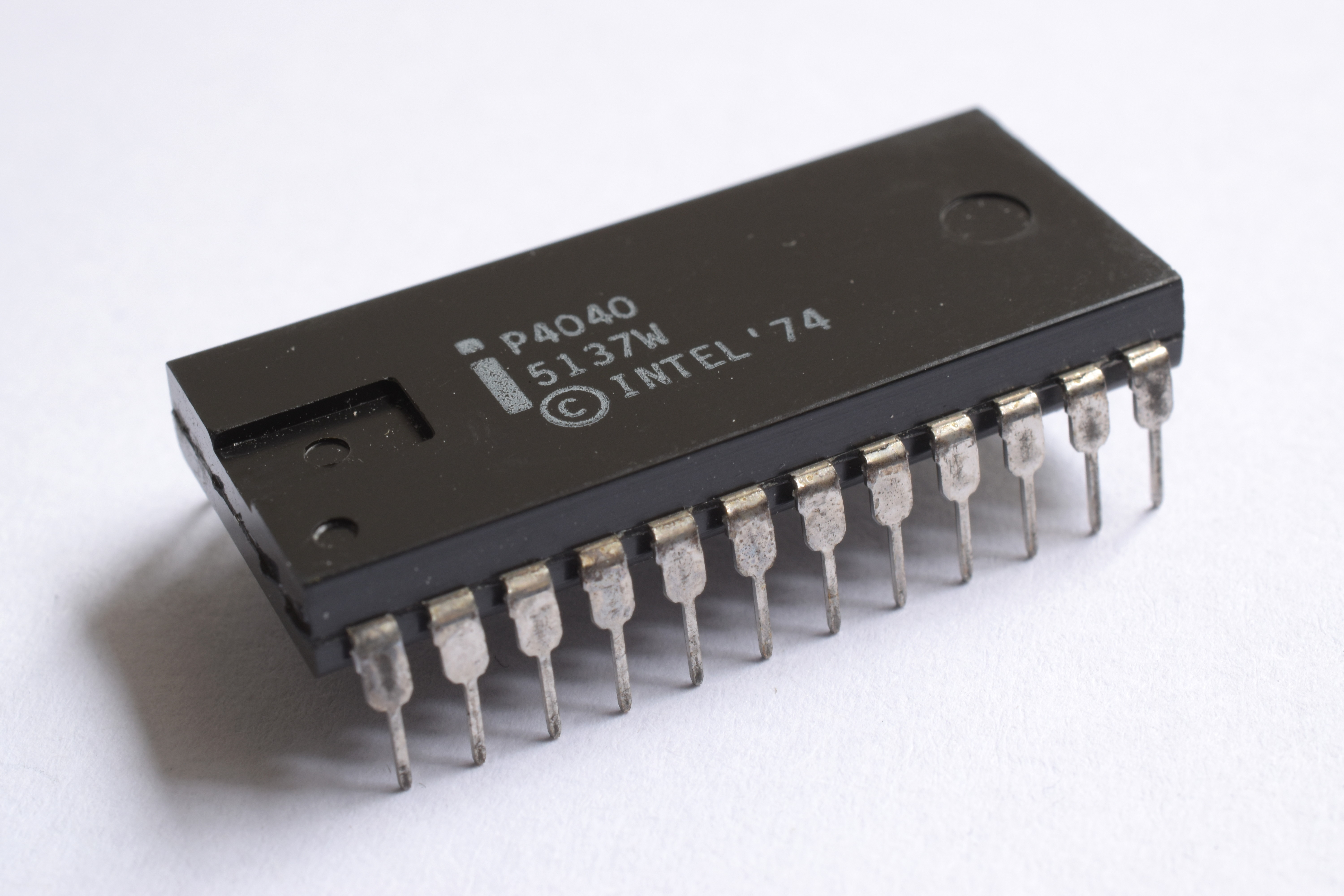 Procesoro Intel P4040.